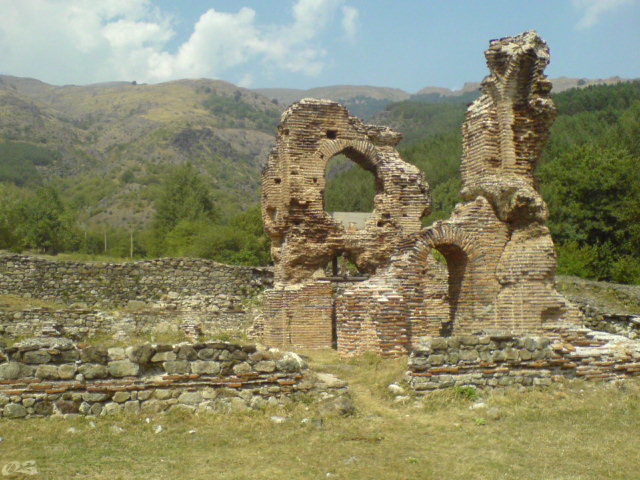 Еленската базилика край град Пирдоп